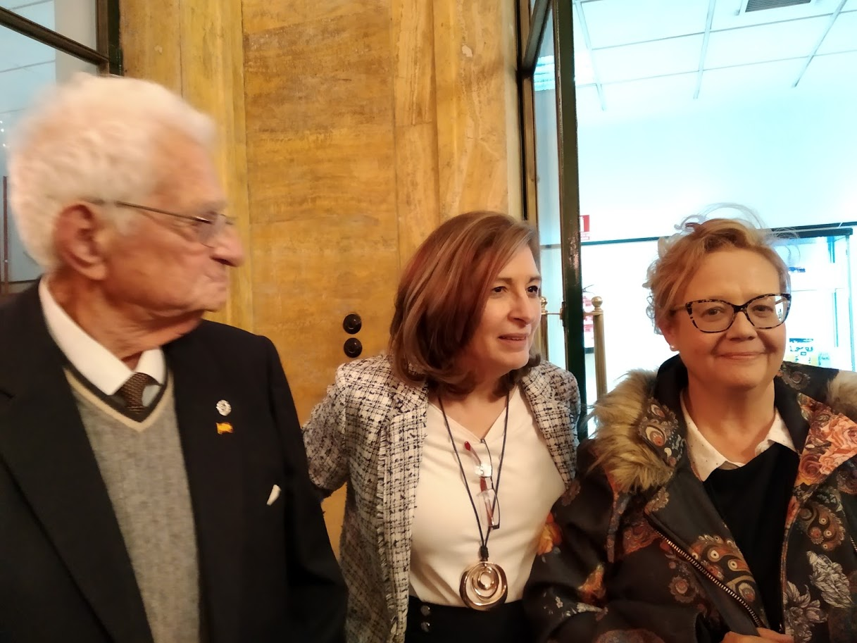 Victoria Crespo, investigadora y biógrafa, Julio Azcárate Román, nieto y Carmen Marco Azcárate, biznieta de Violeta el 22 de abril de 2019 en homenaje a Consuelo Álvarez, Violeta dentro del XIII Memorial Clara Campoamor organizado por la la Asociación de Amigos del Telégrafo